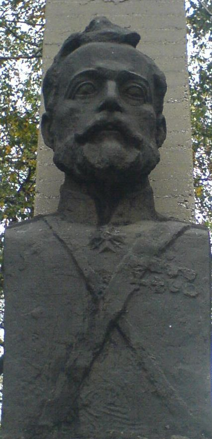 Олимпи Панов - бюст от композицията "Паметника на капитанита" Сливница Autor:Biser Todorov